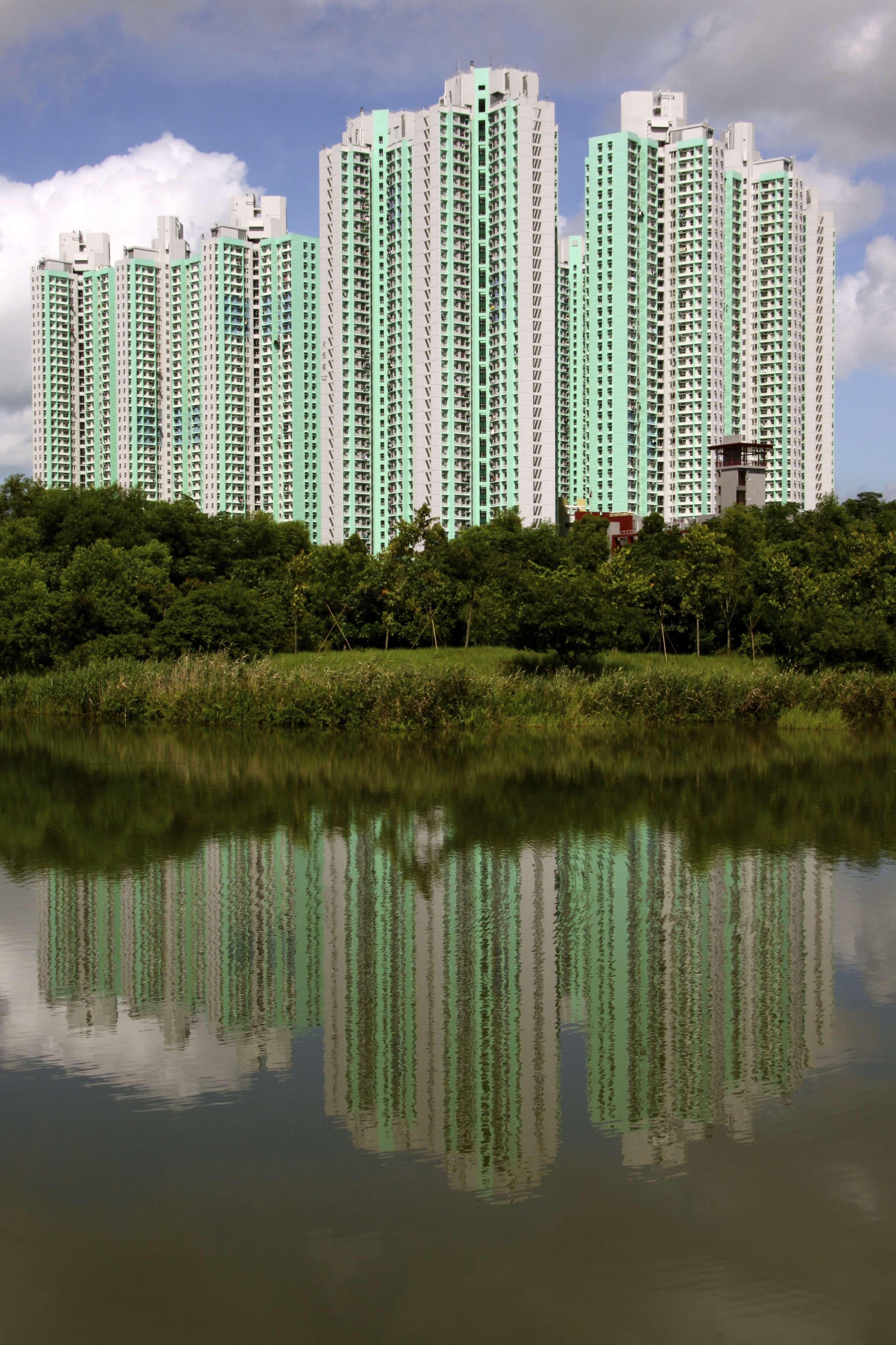 Hong Kong Wetland Park